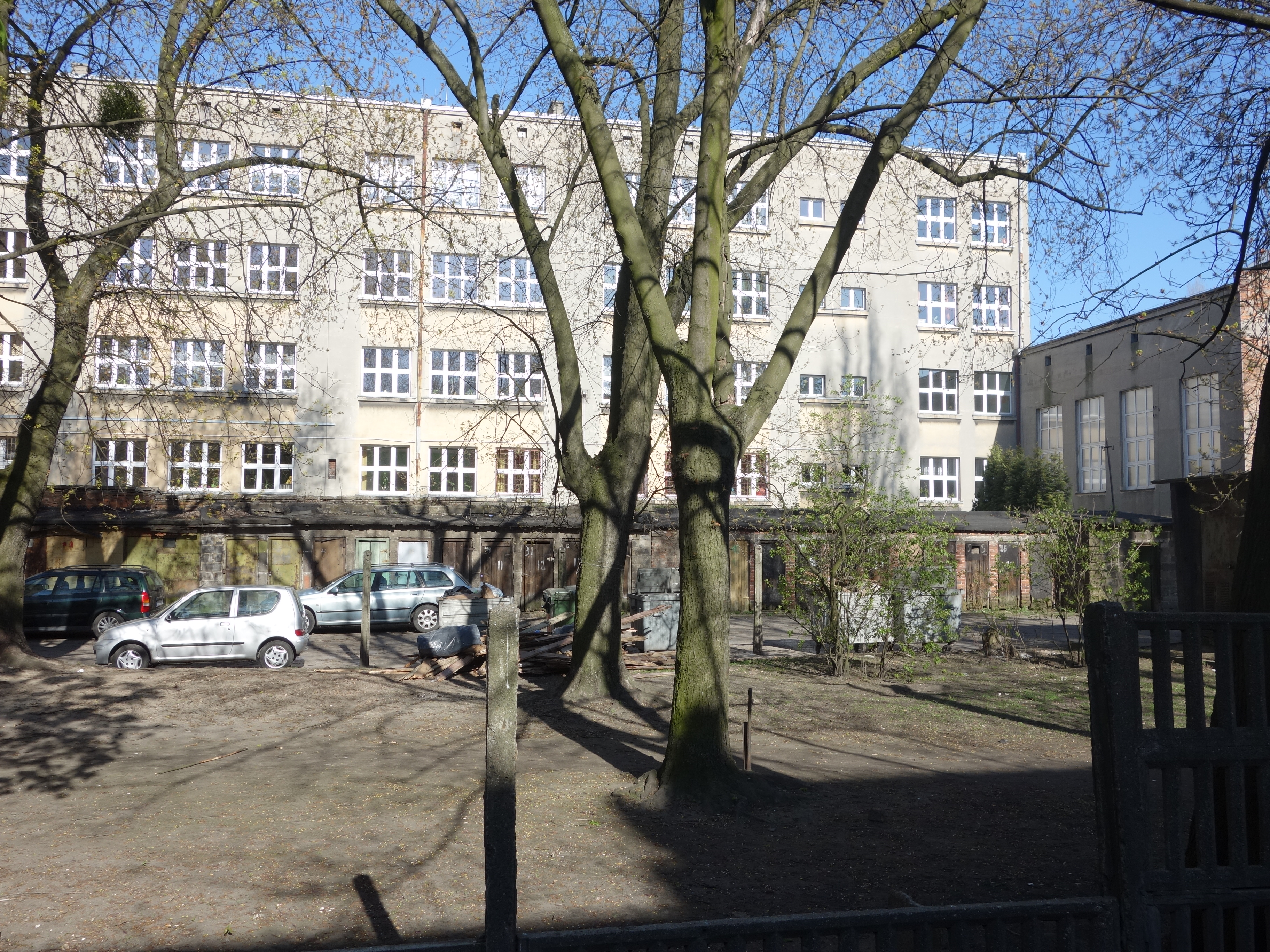 Grundschule (Szkoła Podstawowa) Nr. 4 der Stadt Łódź in der heutigen Aleja Józefa Piłsudskiego 101 (Piłsudski-Allee); das Gebäude (hier die Ansicht von Westen) beherbergte während der deutschen Besatzung von 1941 bis 1944 die Günther-Prien-Schule (anfangs als Staatliche Oberschule für Jungen II bezeichnet); die Adresse lautete damals Ostlandstraße 191.